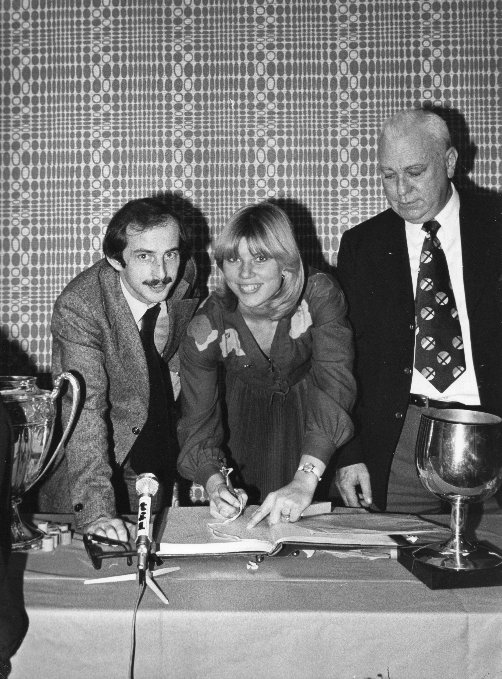 Tirage au sort de la Coupe de France avec Jacques Secrétin, Marie-Christine Debourse et François Jouvenet